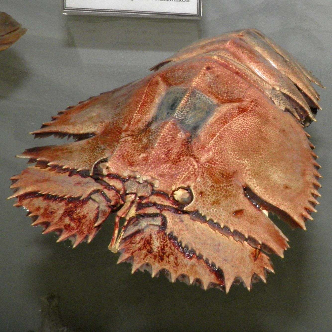 Ibacus ciliatus в океанариуме Владивостока